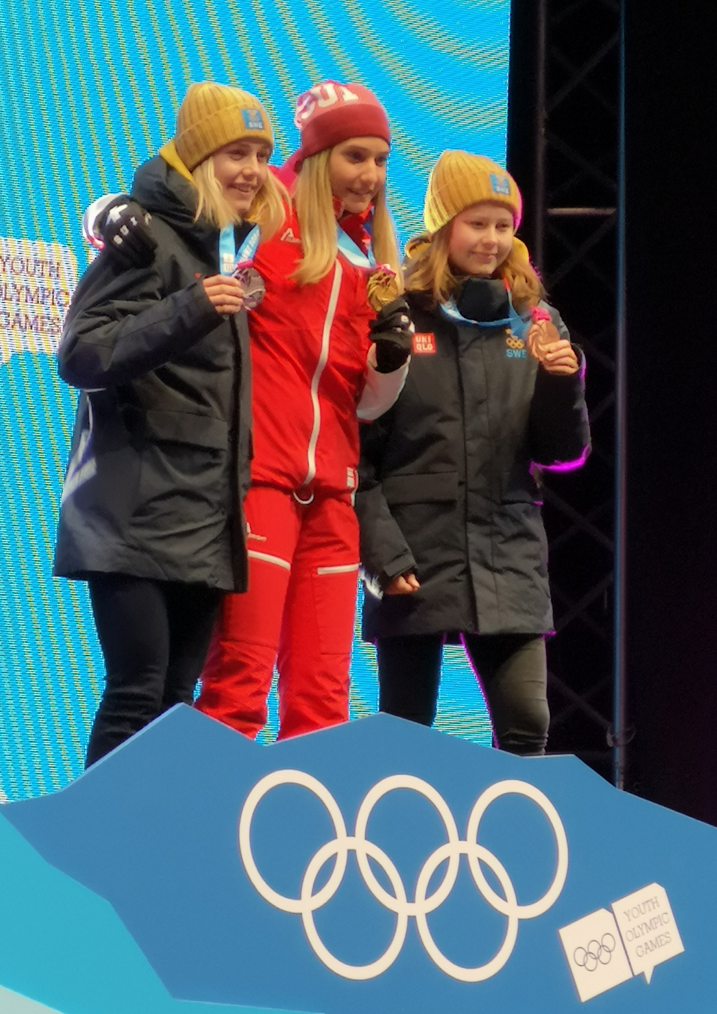 Le podium du cross féminin de ski de fond aux JOJ de Lausanne 2020 : Siri Wigger (SUI), Märta Rosenberg (SWE) et Tove Ericsson (SWE).